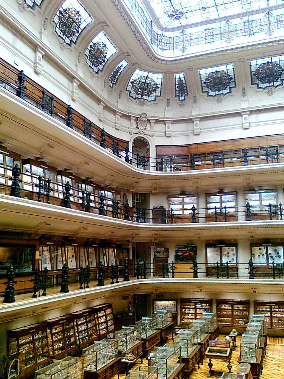 Sala principal del Museo Geominero. Madrid, España